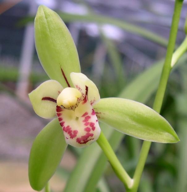 四季蘭 翠玉 夏秋兩季開花 香味迷人